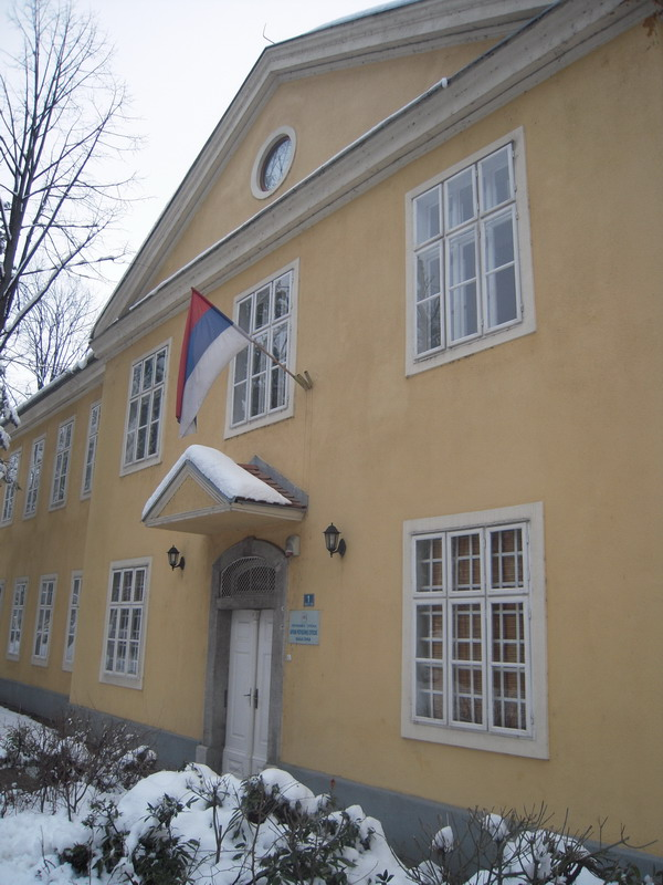 Архив_Републике_Српске